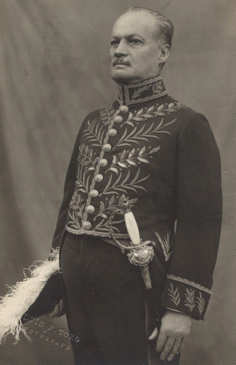 El presidente de la República del Ecuador, Gonzalo S. Córdova, alrededor de 1905.